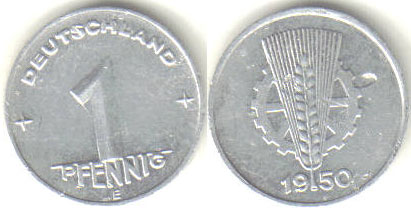 1 Pfeenig de Alemania Oriental, 1950.